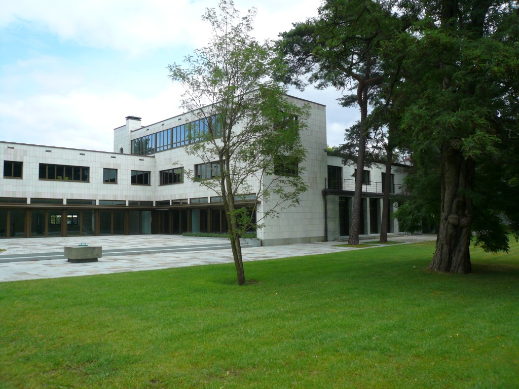 Haus K. in O. -Villa Reemtsma - in Hamburg Othmarschen: Südseite